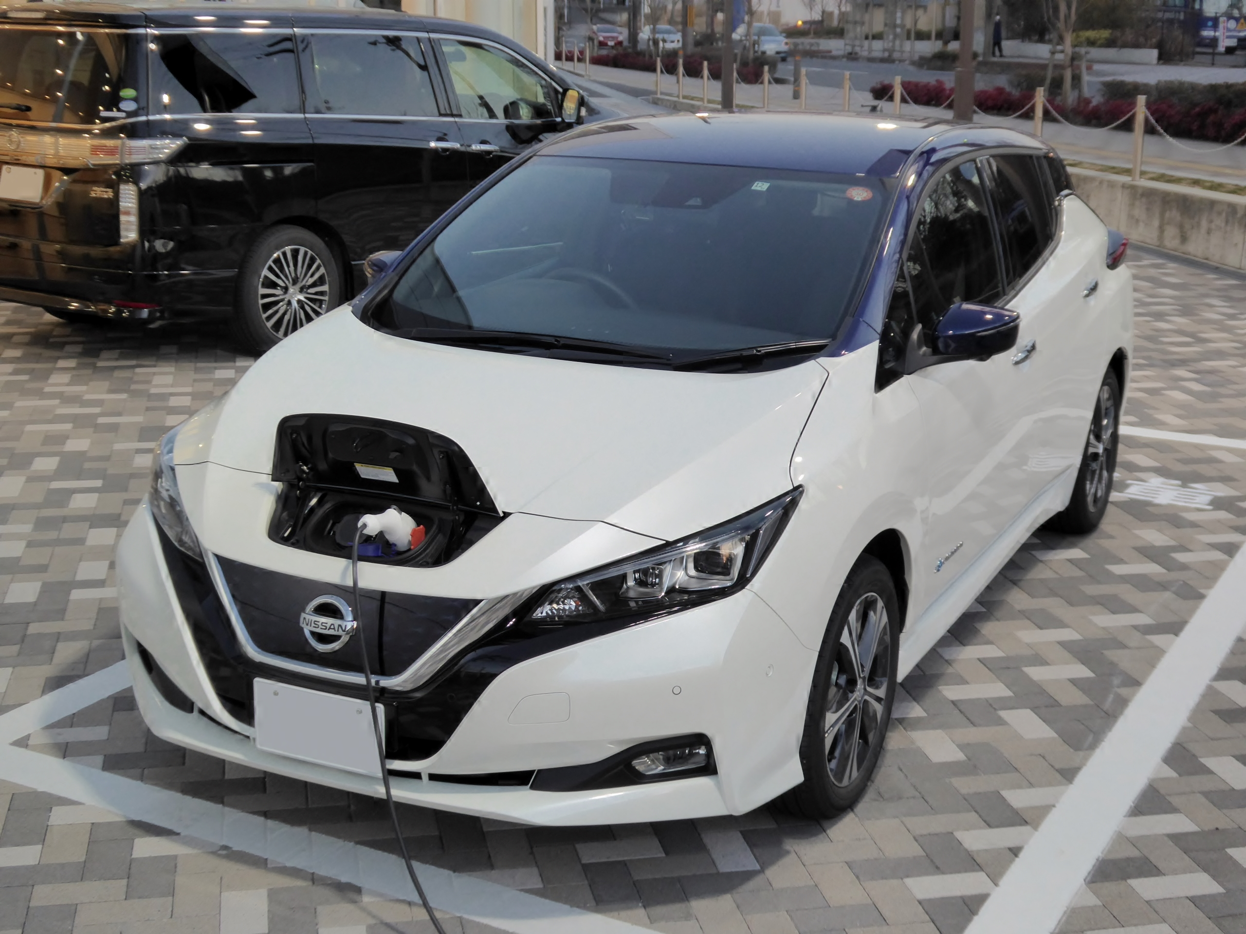 ZAA-ZE1型日産・リーフGをフロントから撮影。